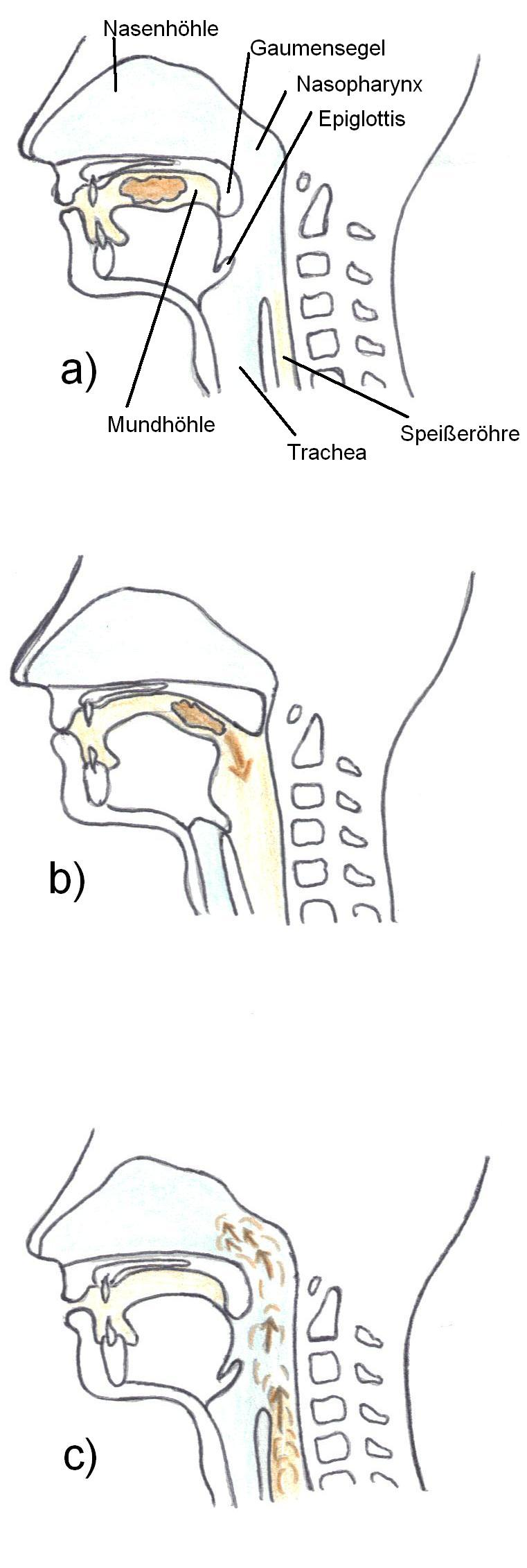 retronasale Wahrnehmung beim Kauen und Schlucken